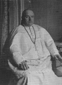 Ferdinand Maria Antonín Hotový (1853 - 1928), Opat kláštera premonstrátů v Nové Říši.